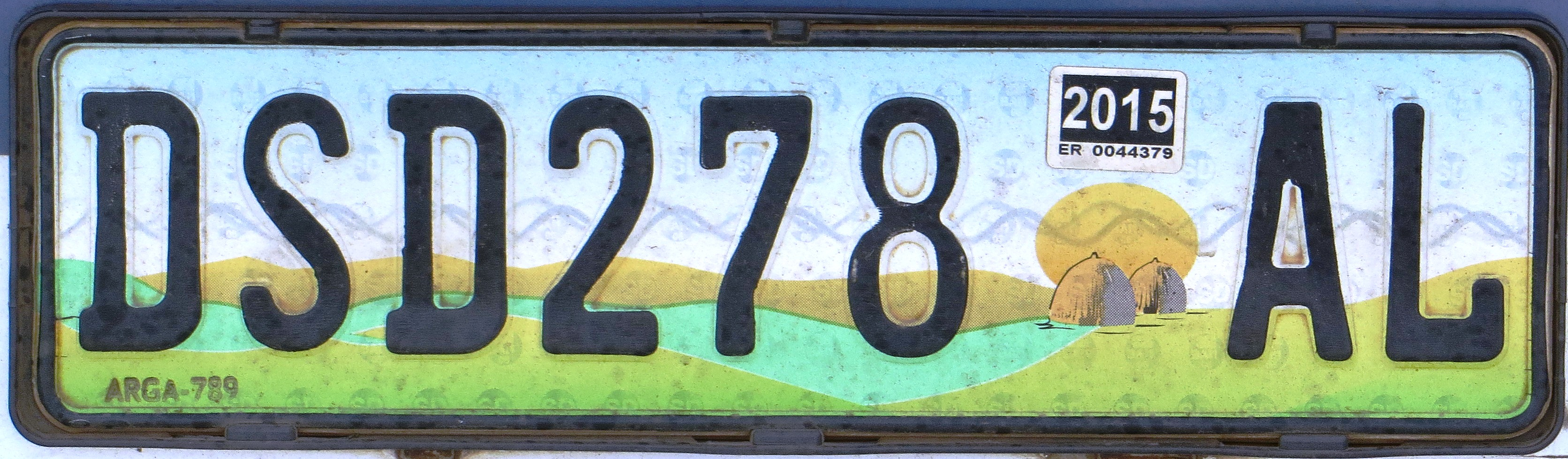 Swaziland kentekenplaat